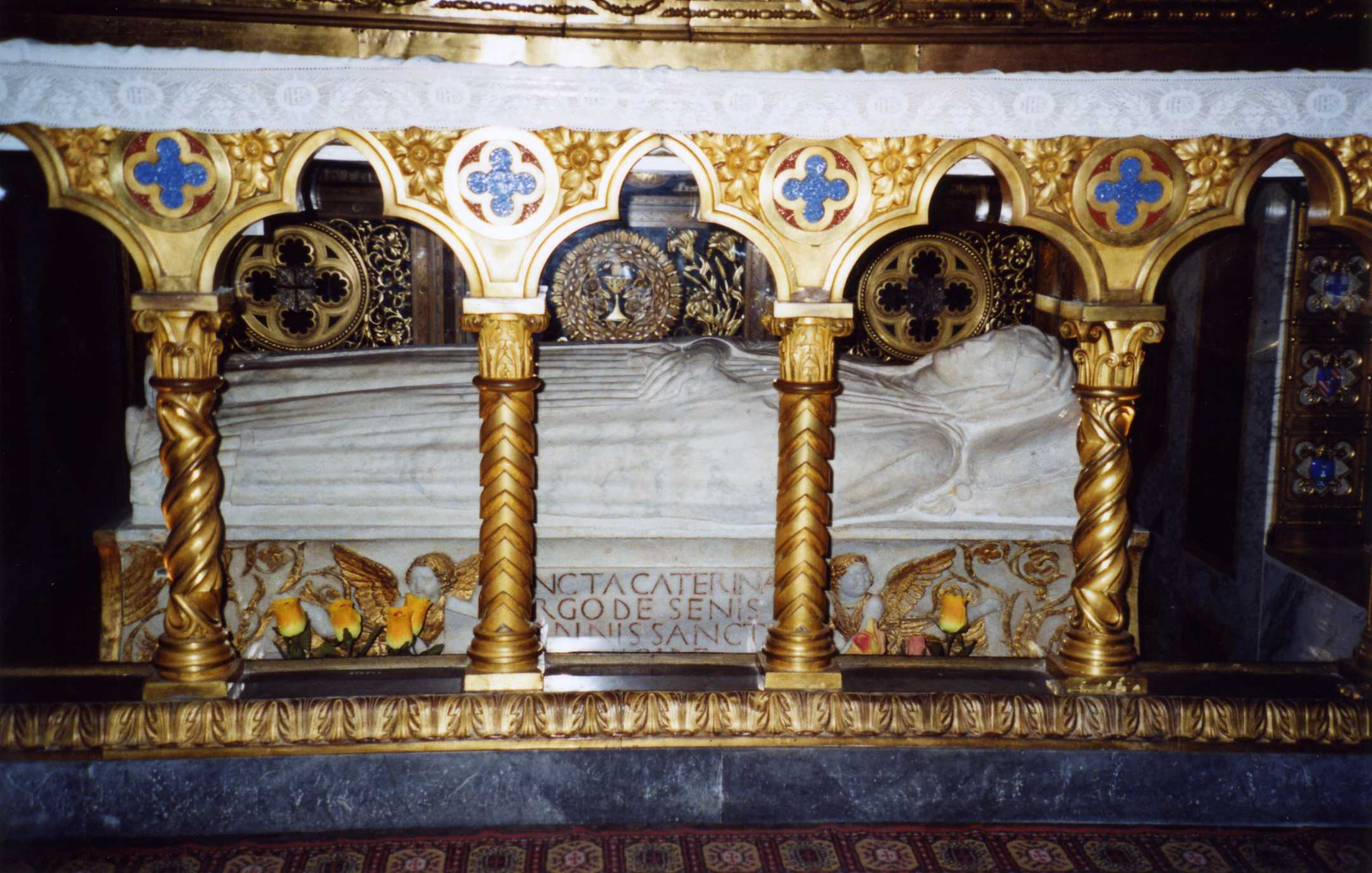 La tomba di Santa Caterina da Siena nella Chiesa di Santa Maria sopra Minerva a Roma